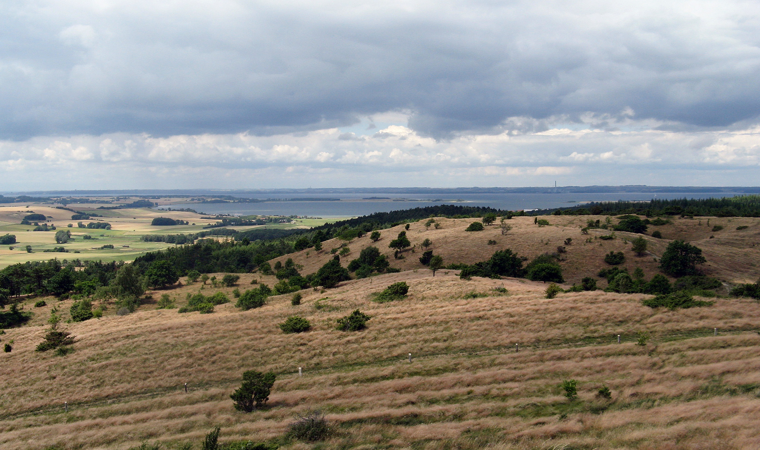 Kalø Vig set fra Mols Bjerge øst for vigen